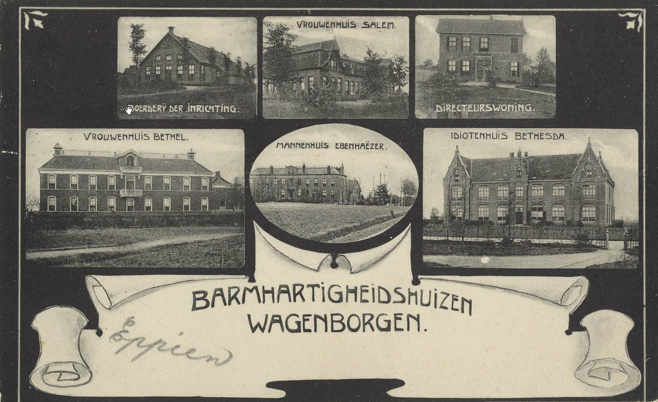 Ansichtkaart met de paviljoens van TCL rond 1905.